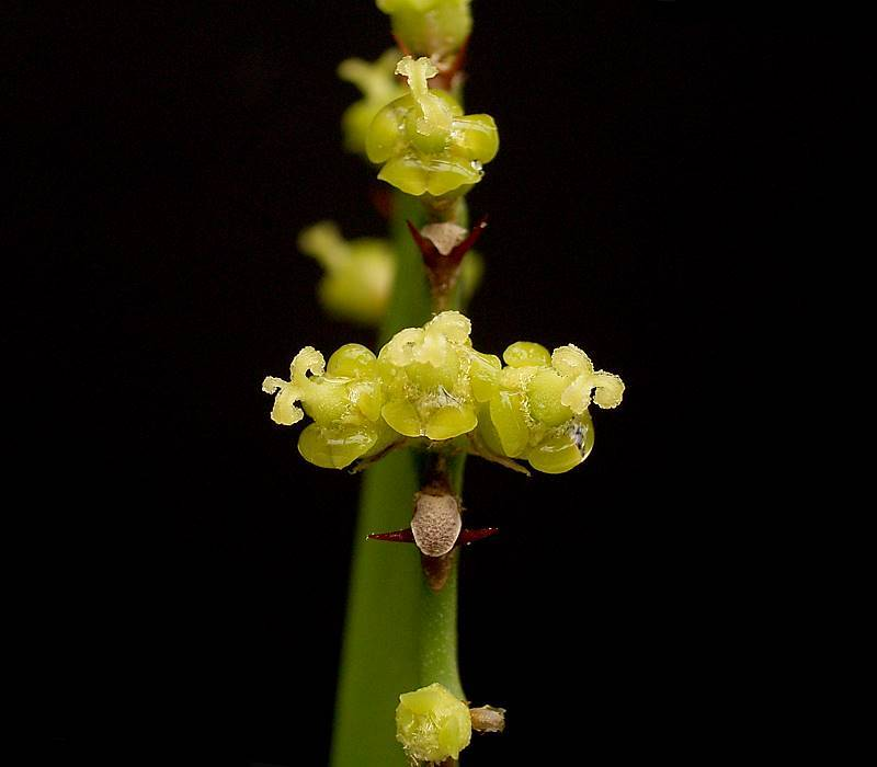 Euphorbia vajravelui